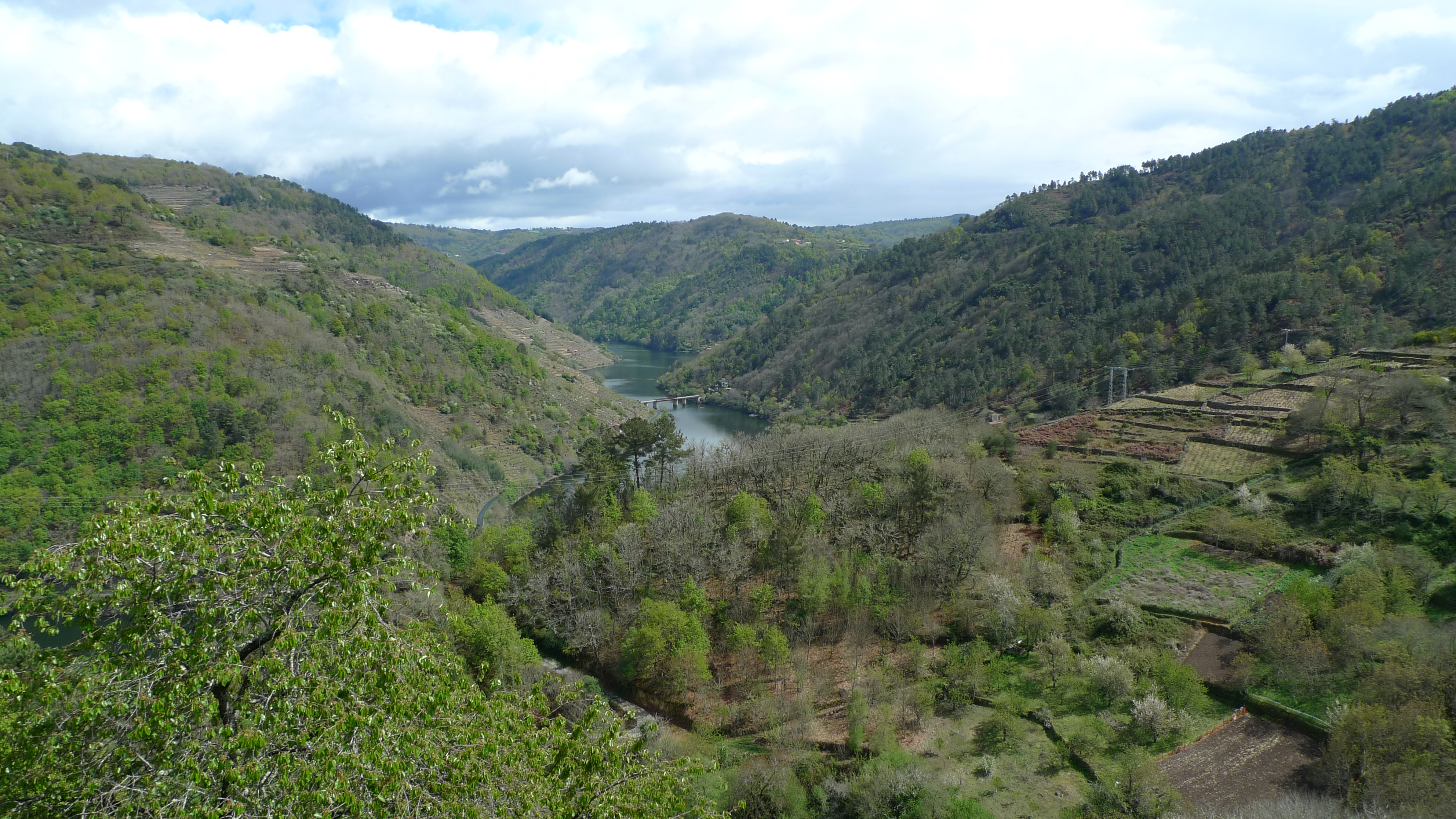 Vista das ribeiras do Miño en Sequeiras (Chantada)